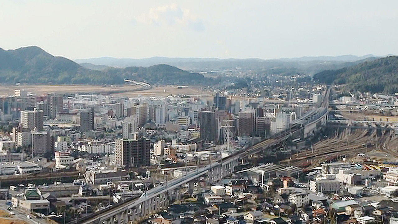 2012年1月